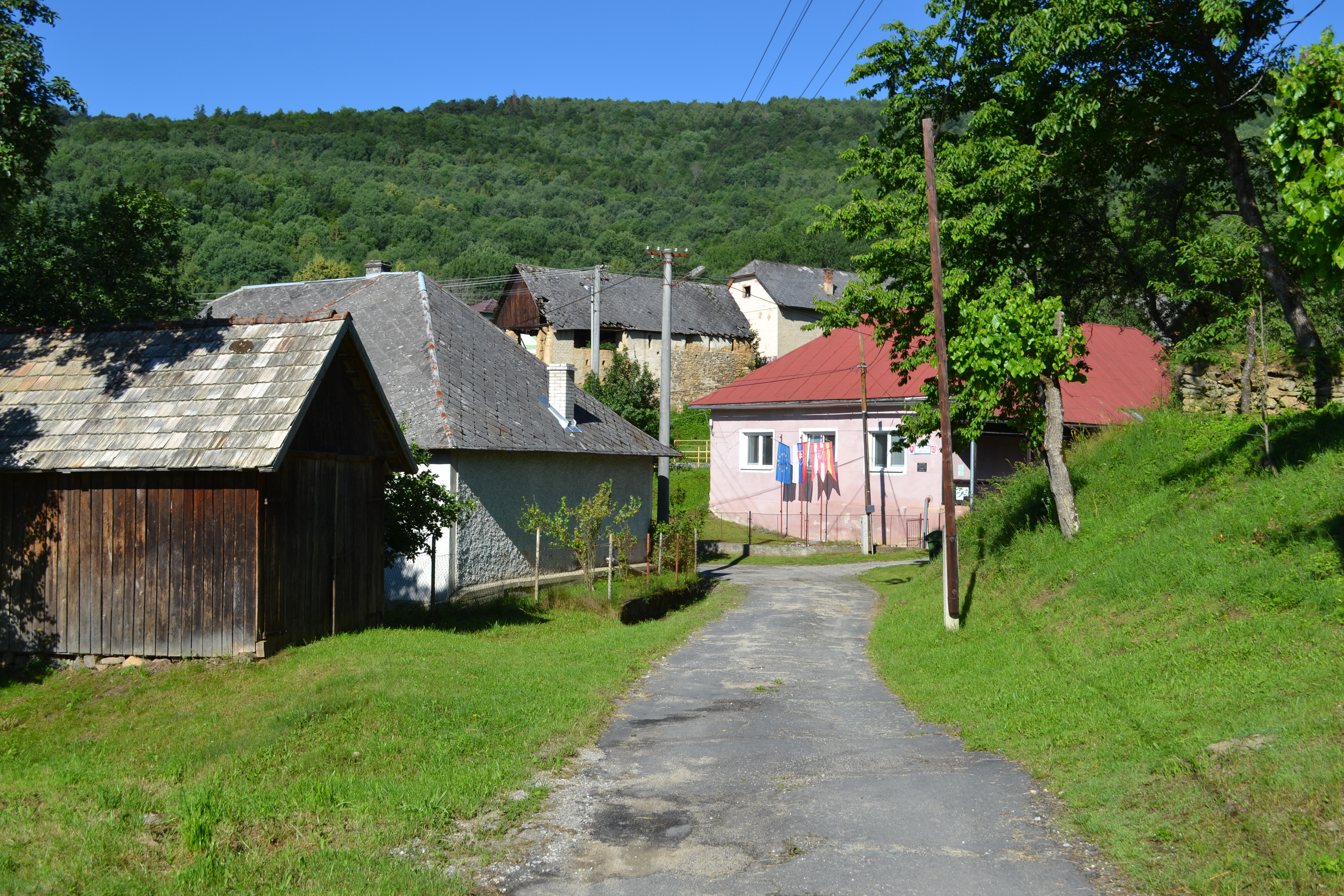 Ulica obce Hrlica